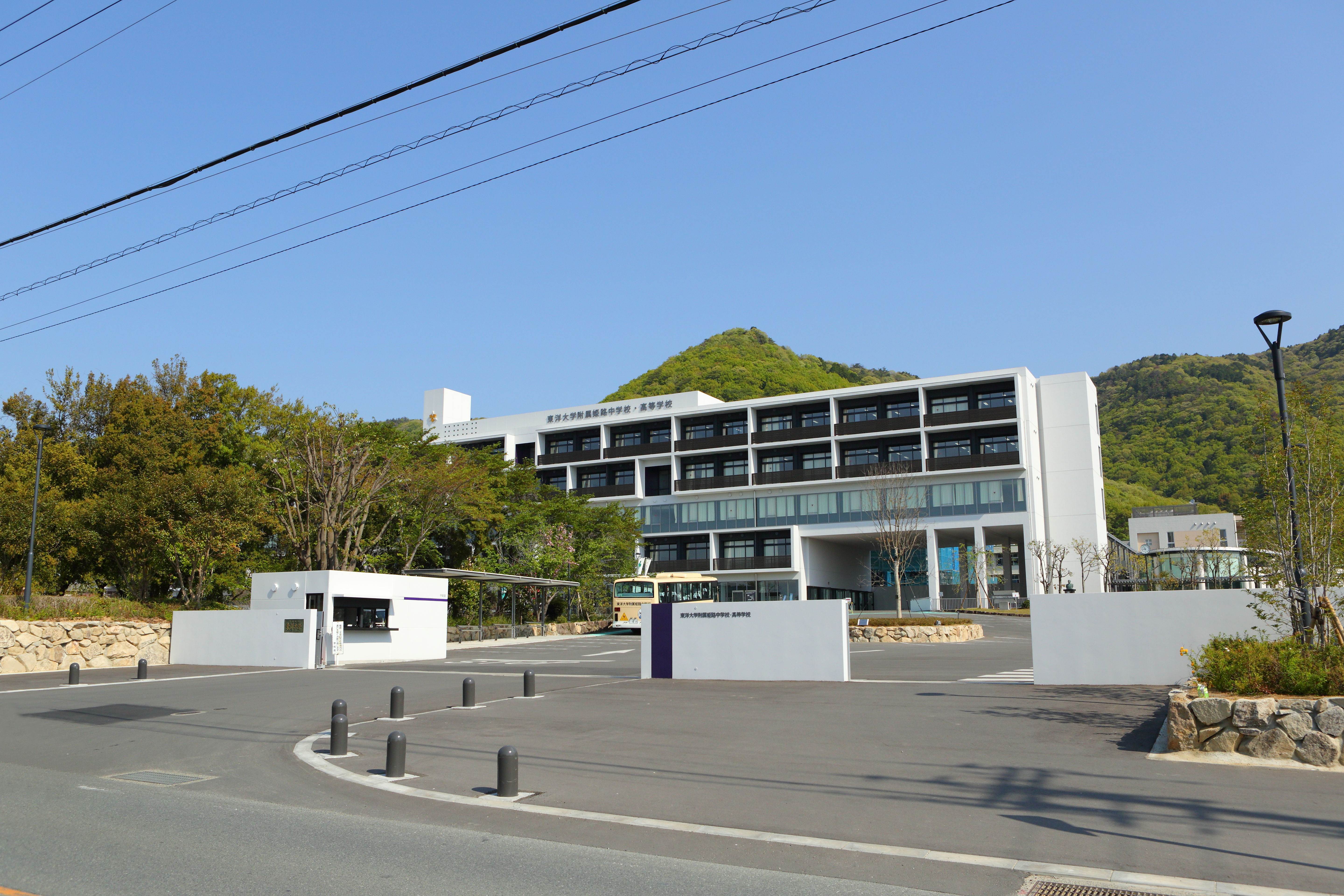 新校舎完成後の正門